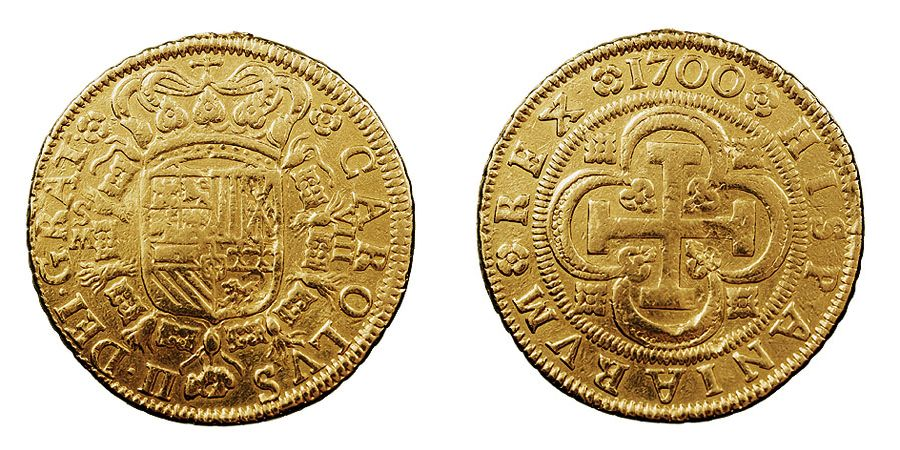 Moneda de vuit escuts encunyada en 1700 al regnat de Carles II d'Espanya. És una peça d'or fabricada a Sevilla.